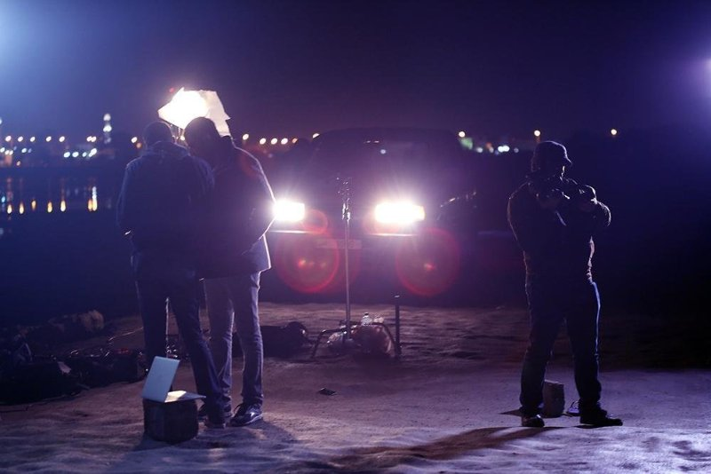 موقع تصوير فيلم المندس